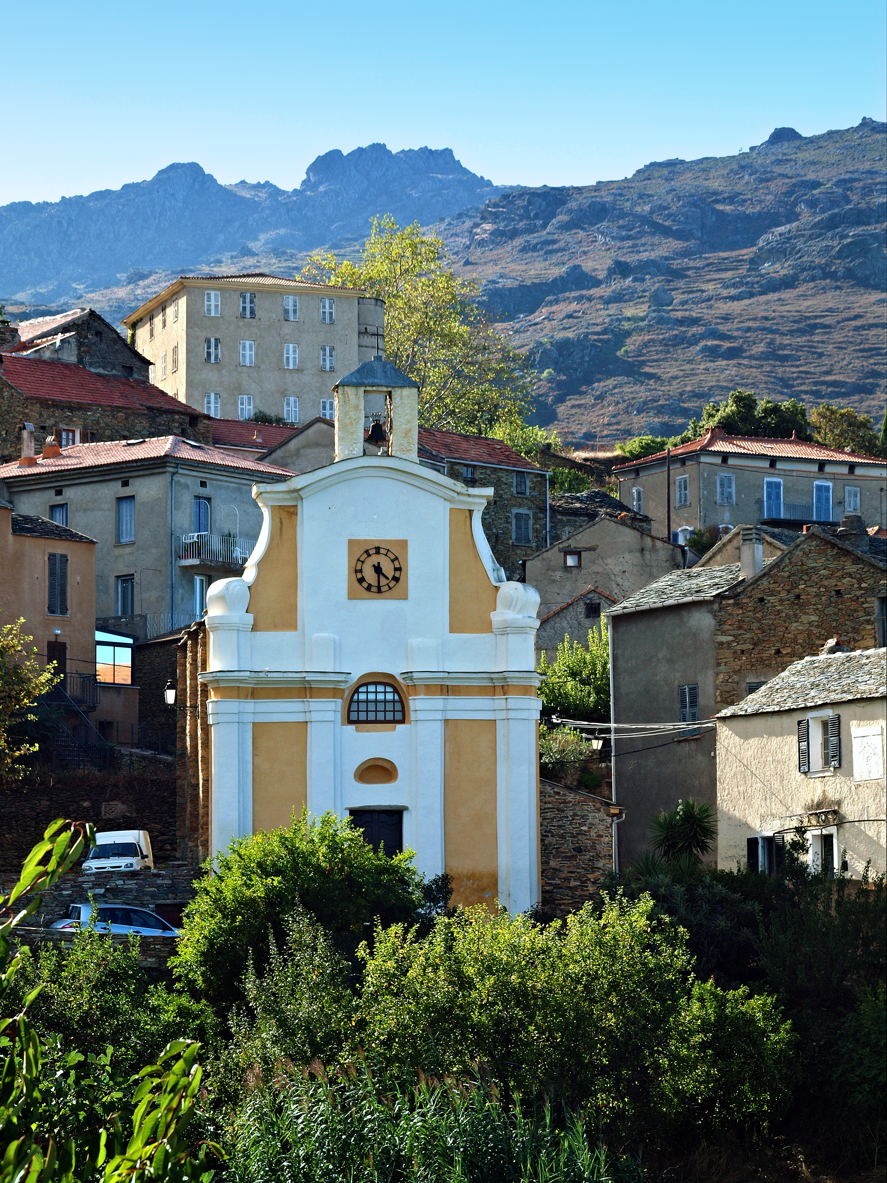 Sorio, Nebbio (Corse) - Vue du centre du village